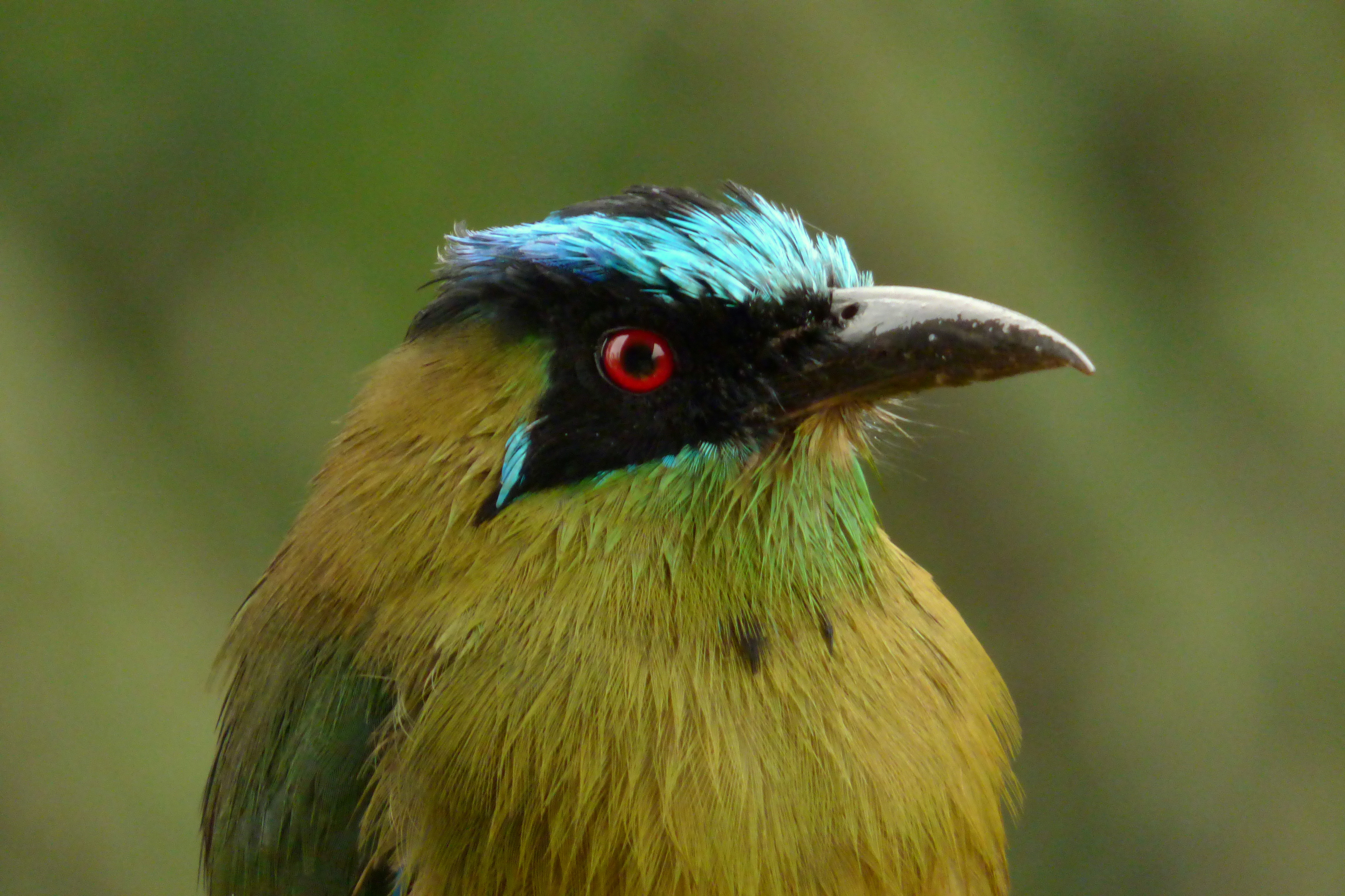 Momotus aequatorialis (Barranquero)